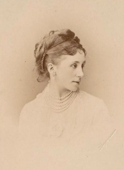 Княгиня Ольга Петровна Долгорукова, ур. графиня Шувалова (1848—1927).